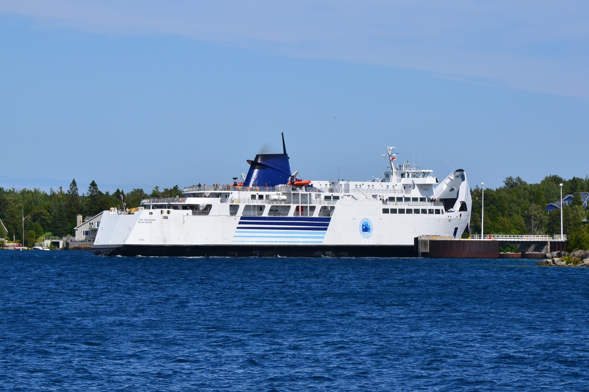 Prom MS Chi-Cheemaun wpływa do portu Tobermory